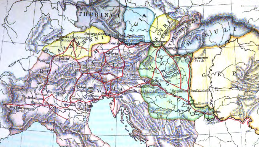 Localisation approximative du peuple turcilingue.